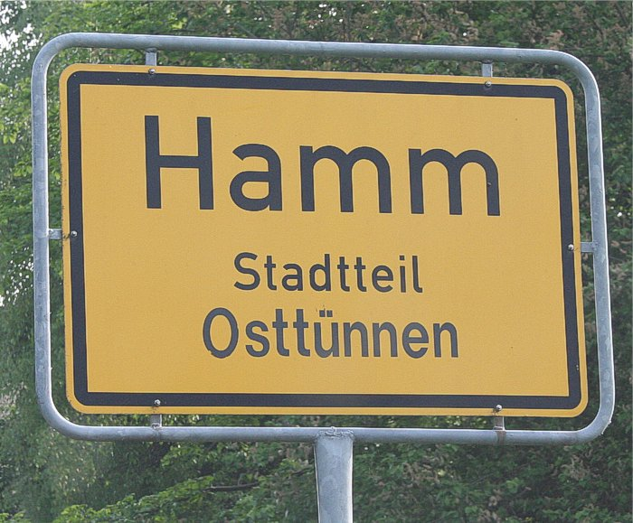 Ortstafel Osttünnen